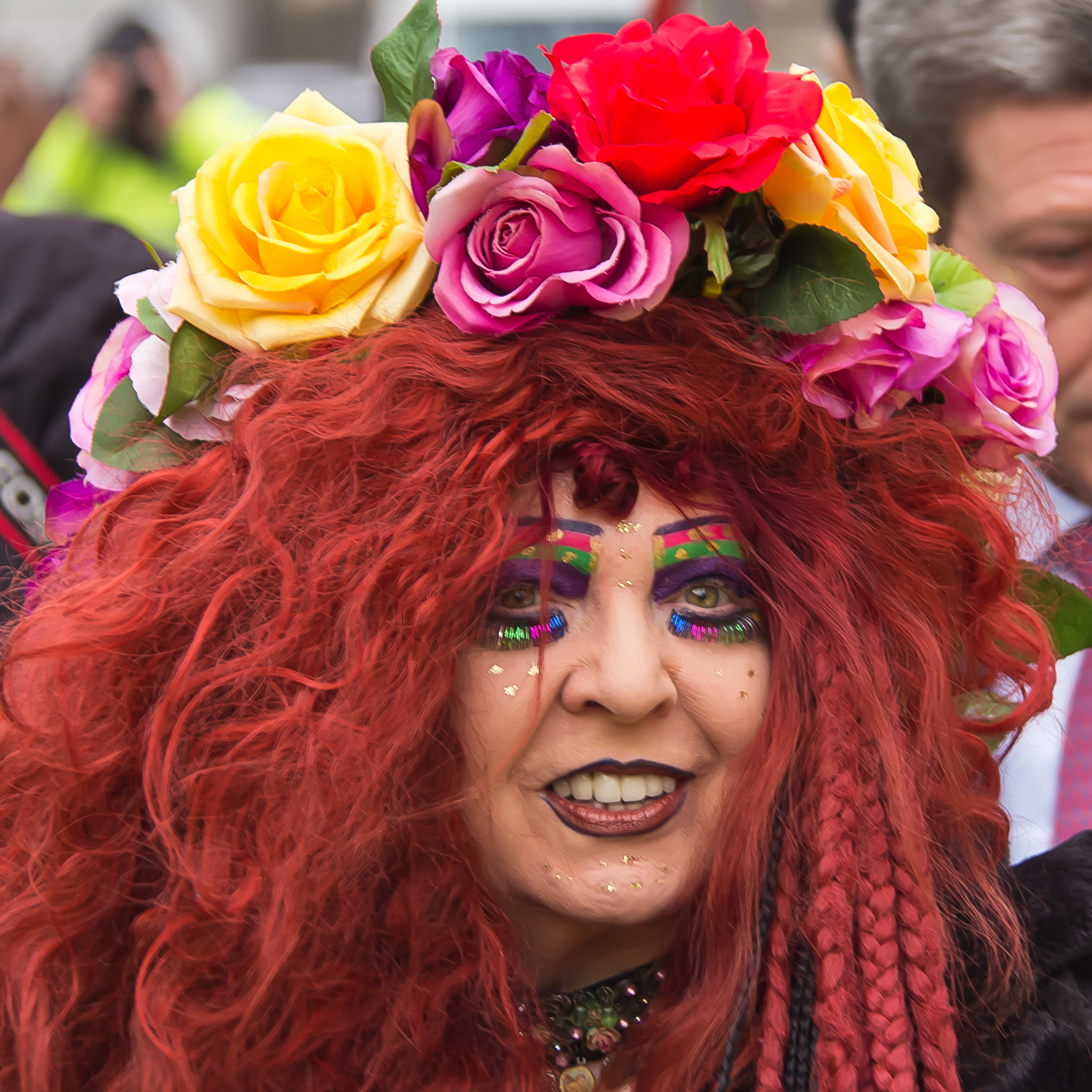 Rückkehr des Flügelautos auf den historischen Treppenturm des Kölnischen Stadtmuseums. Im November 2012 musste das Kunstwerk abgenommen werden, um Mängel an der Betonstandplatte auf dem Turm zu beheben. Auszubildende der Kölner Ford-Werke in Niehl restaurierten zeitgleich das Flügelauto. Bei dieser Generalüberholung lackierten sie den „Vogel“ komplett neu und ersetzten die Haube, die Heckklappe sowie die Radkappen. Foto: Elke Koska, „Muse“ von HA Schult